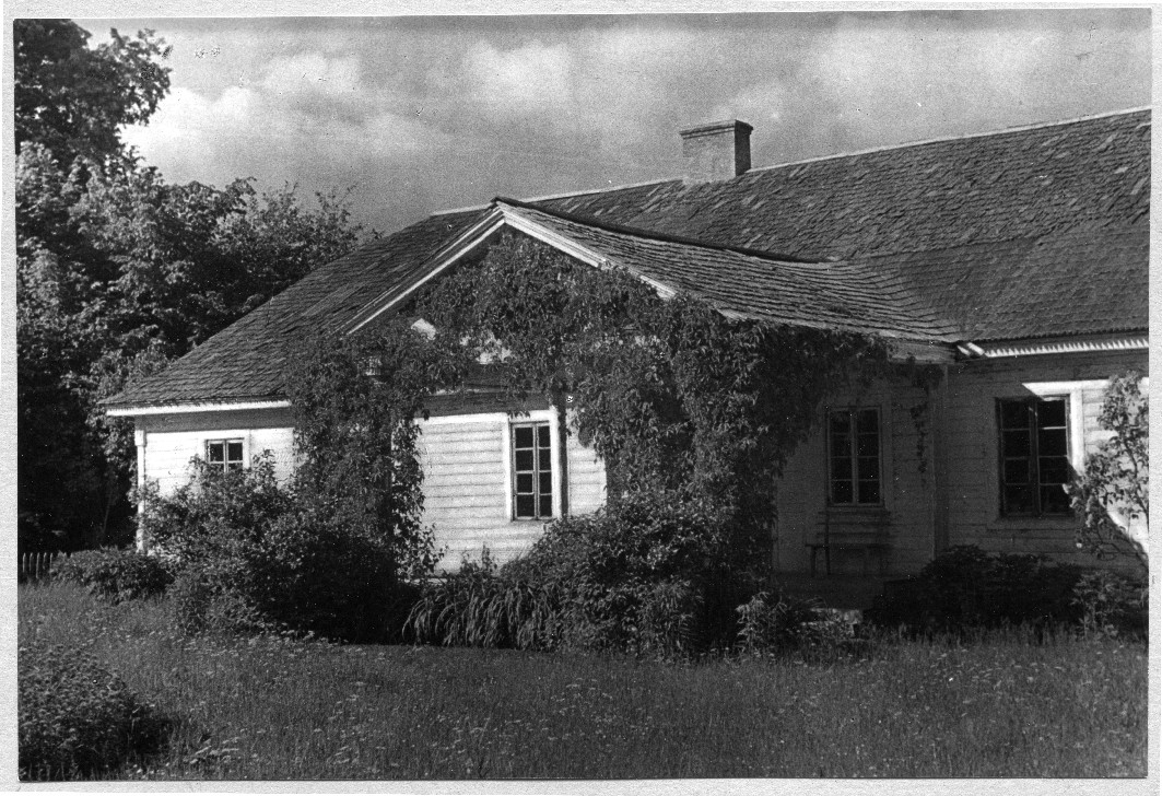 Беларуская (тарашкевіца): Галаблеўшчына (Hałableŭščyna), сядзіба Браноўскіх (Branoŭski)